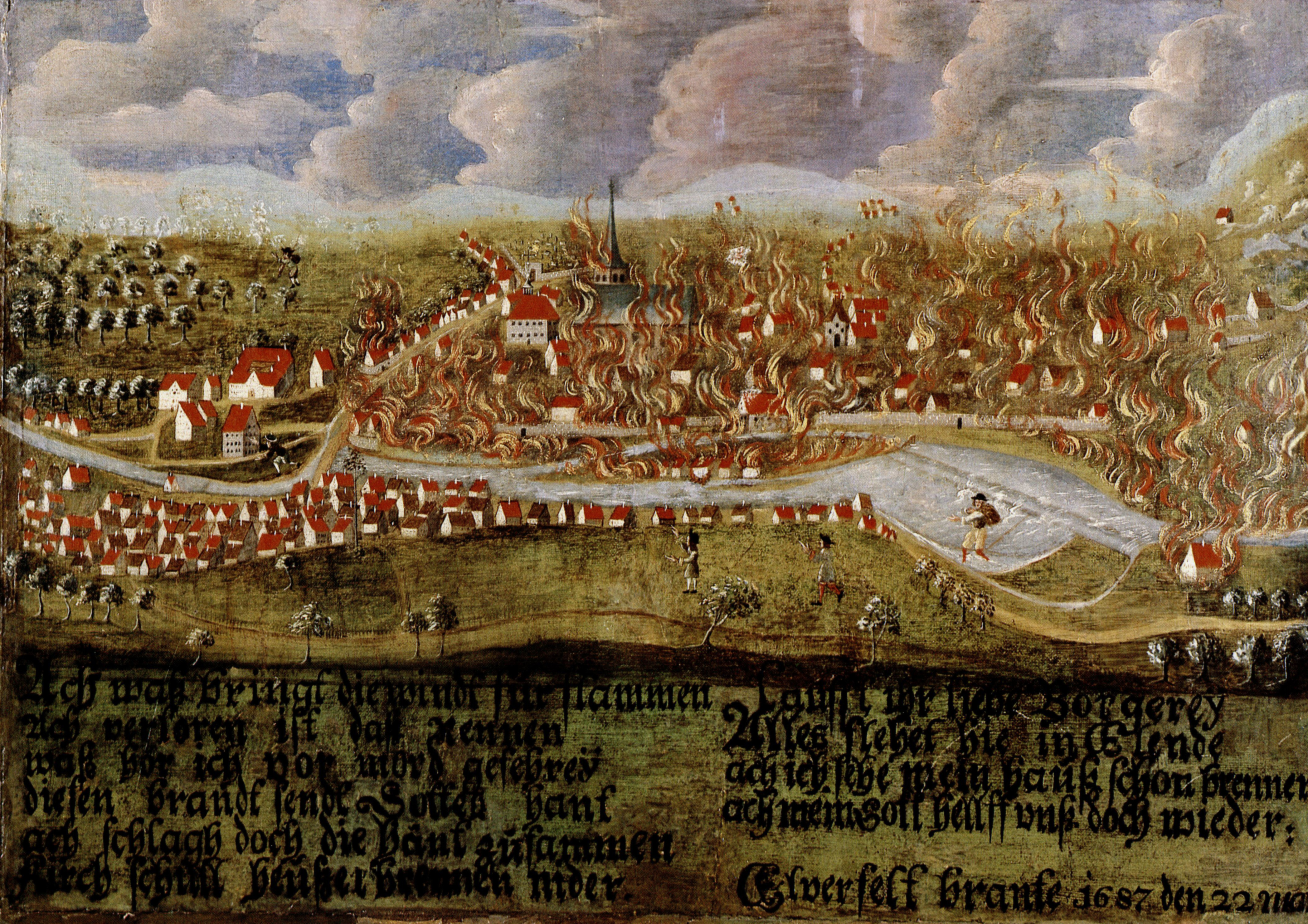 Teil eines vierteiligen Bilderzyklus von Elberfelder Stadtansichten, gemalt um ca. 1710, und im ersten Elberfelder Rathaus ausgestellt.